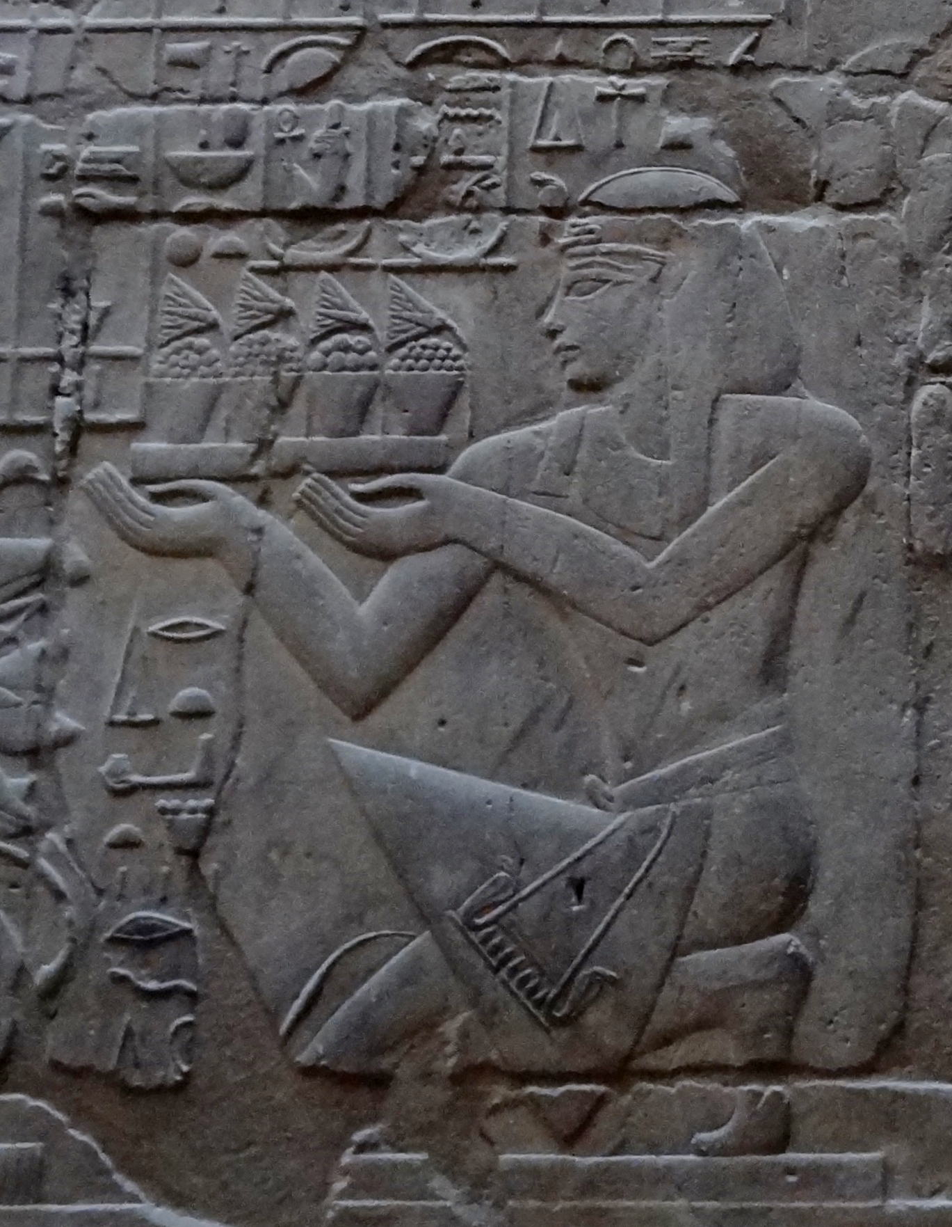 Relief an der westlichen Außenseite des Alexandersanktuars im Luxor-Tempel, Ägypten